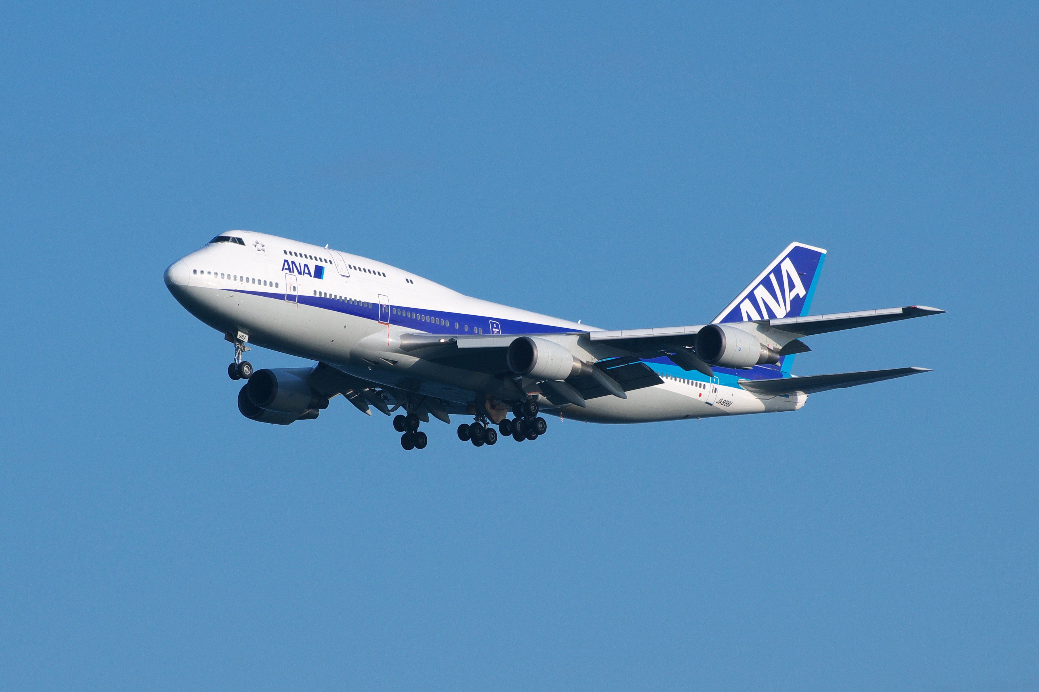 着陸進入中のANAのジャンボです。 川崎市の浮島公園にて。